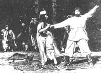 Illustration tiré du film Stenka Razine, de Vassili Gontcharov, mort en 1915.